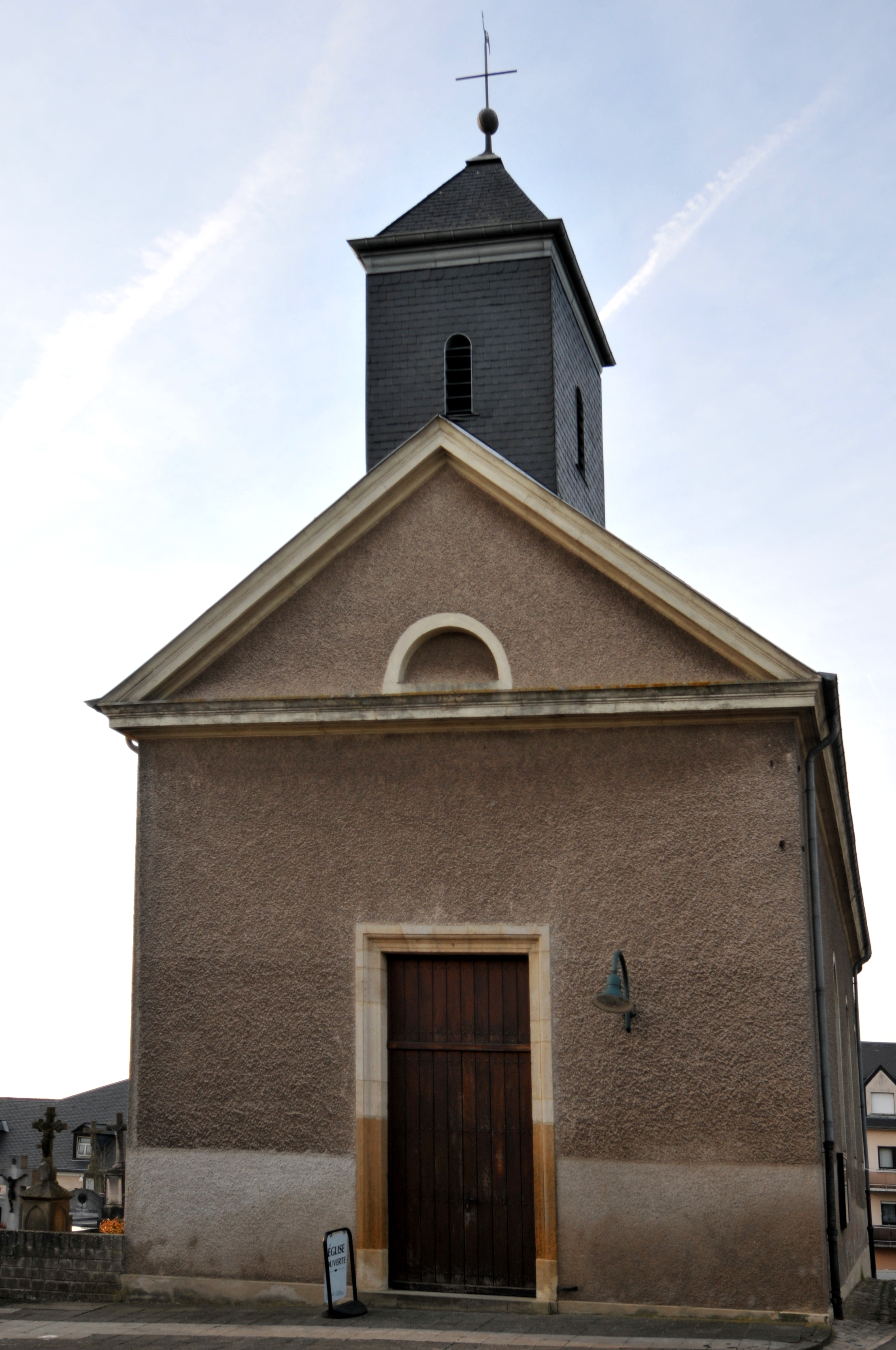 D'Kierch zu Peppeng.